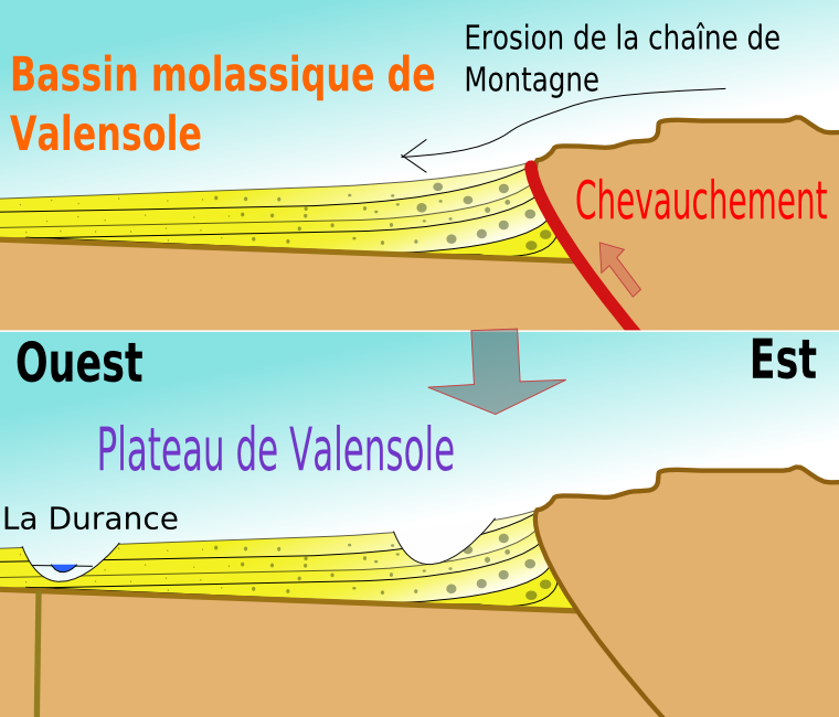 géologie du plateau de Valensole